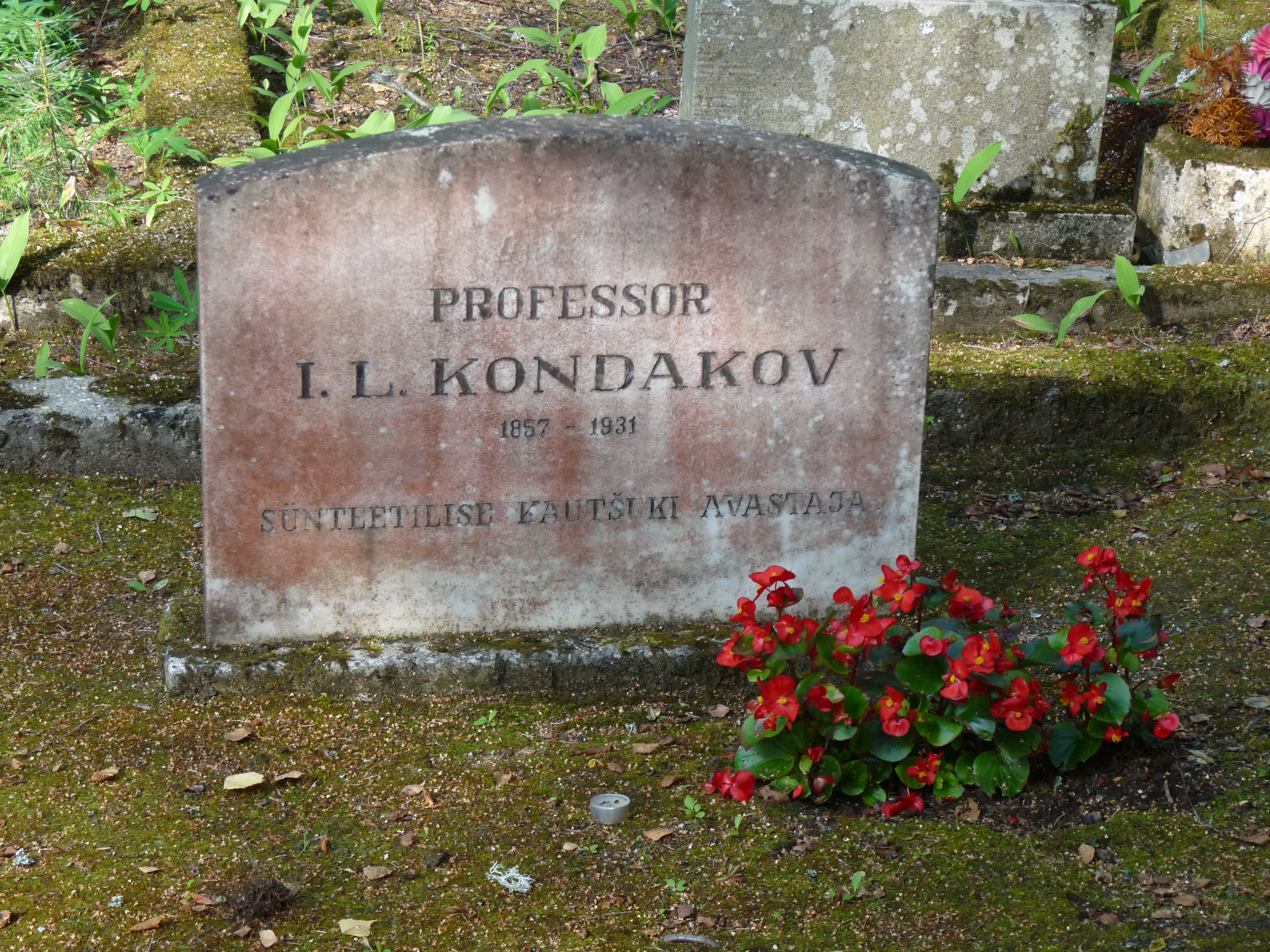 Ivan Kondakovi hauakivi Elva kalmistul